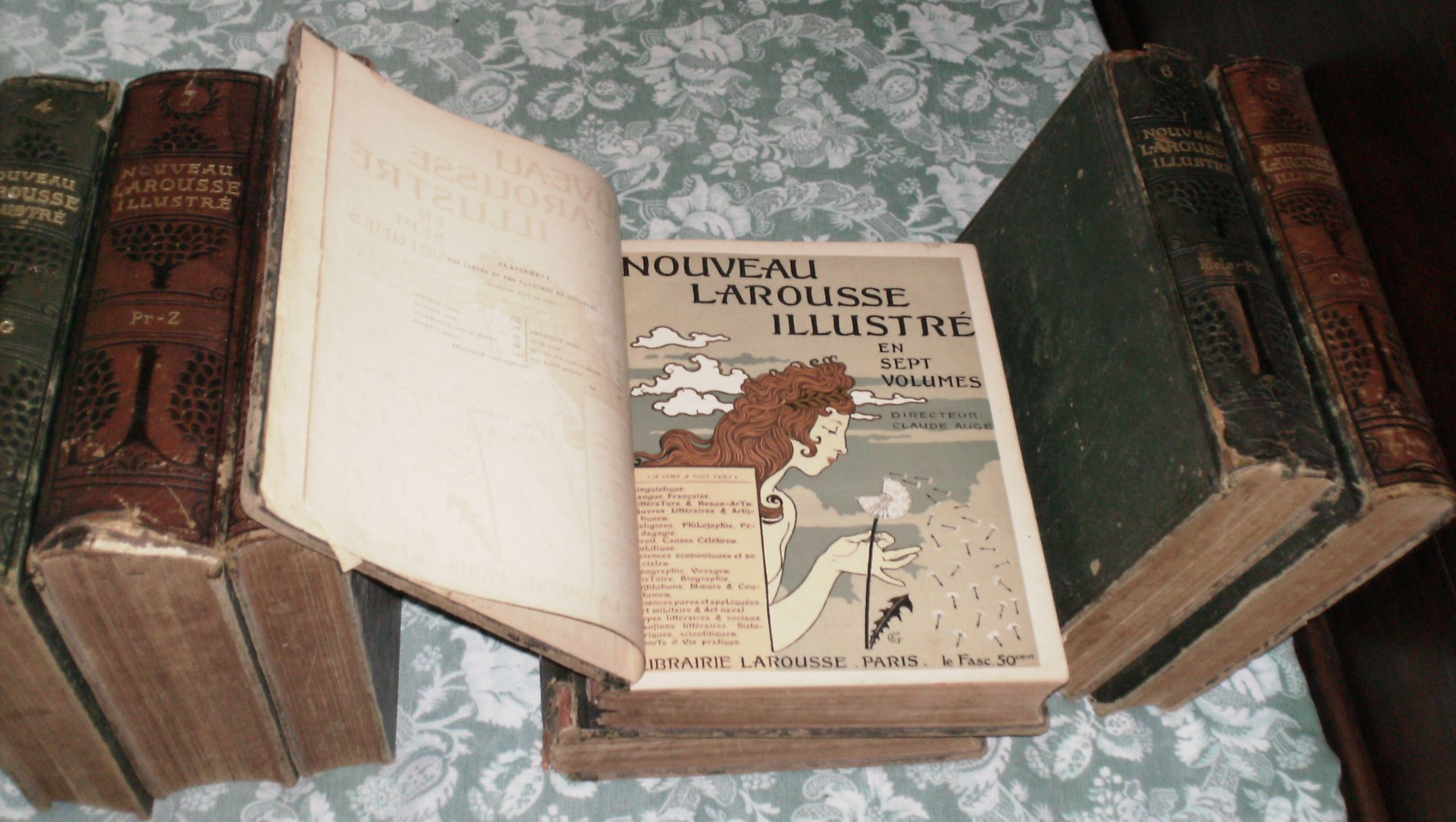 Le Nouveau Larousse illustré, Paris, Larousse, 1897-1904, 7 vol. [+ 1 supplément en 1907]